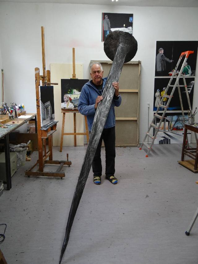 Hartmut Wiesner im Atelier mit Nagel